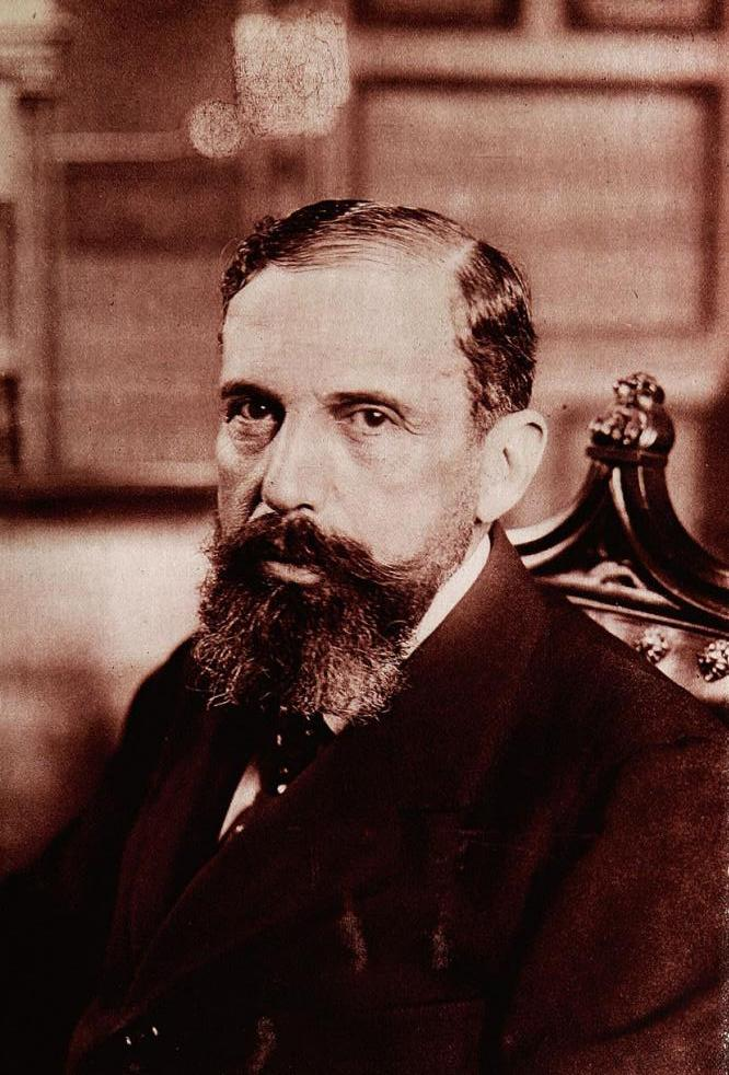 Víctor Ismael Valdés Valdés (1859-1949) fue un Diputado, Senador, Ministro ,Bombero e Ingeniero civil chileno.